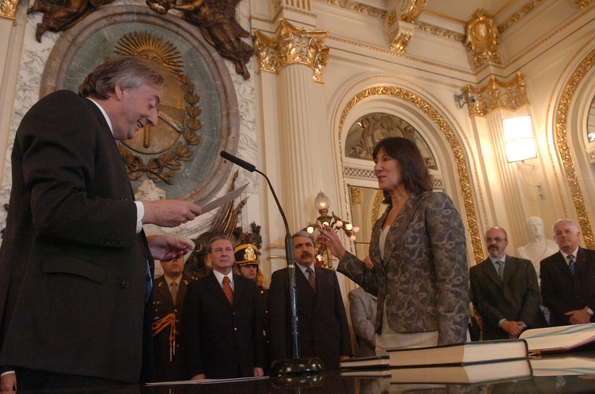 El presidente Néstor Kirchner pone en funciones a la flamante ministro de Economía, Felisa Miceli, durante el acto de asunción de los nuevos integrantes del Gabinete Nacional.